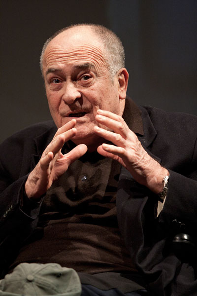 Foto di Elisa Caldana / Cinemazero